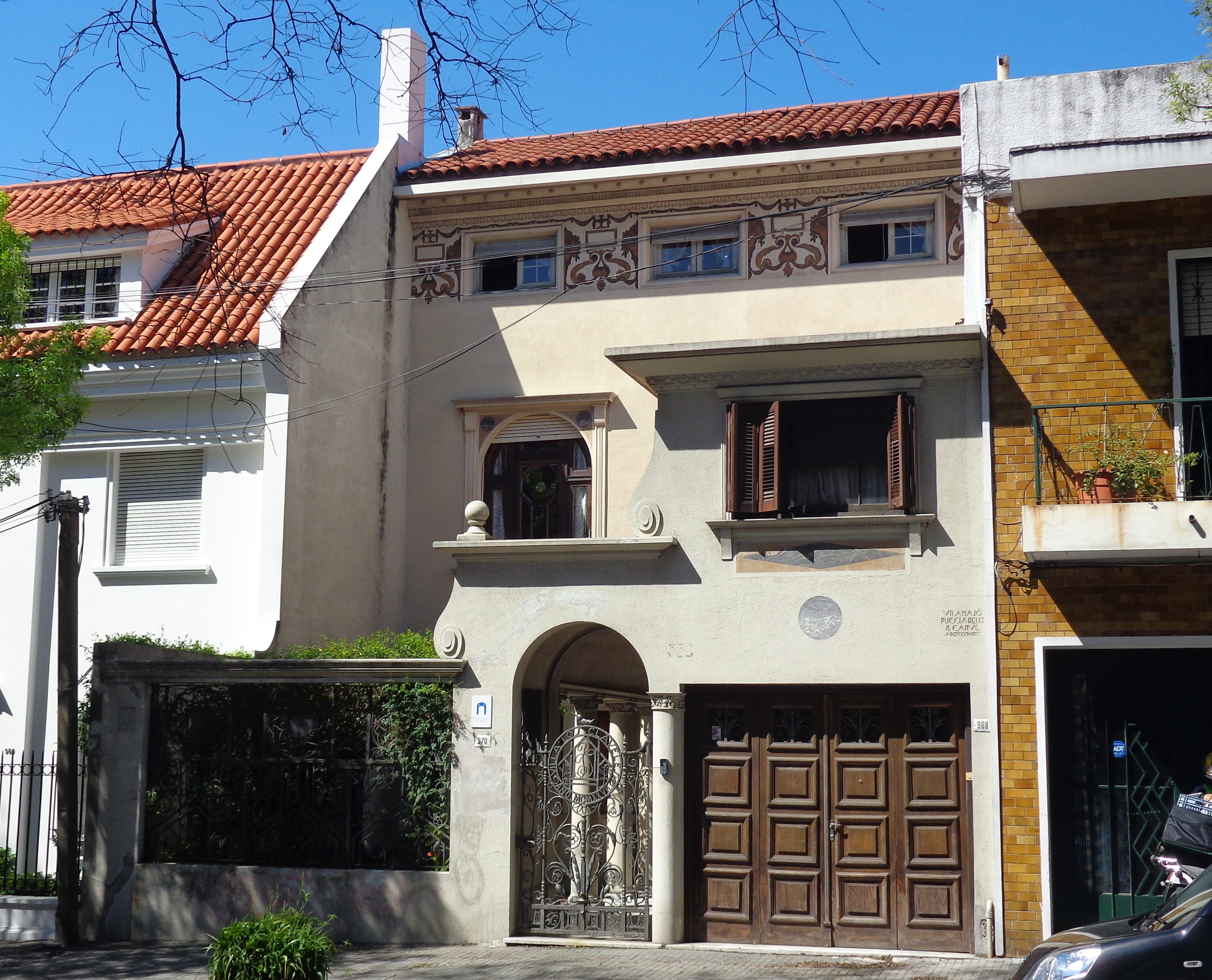 Casa de Felipe Yriart. Ubicada en el departamento de Montevideo